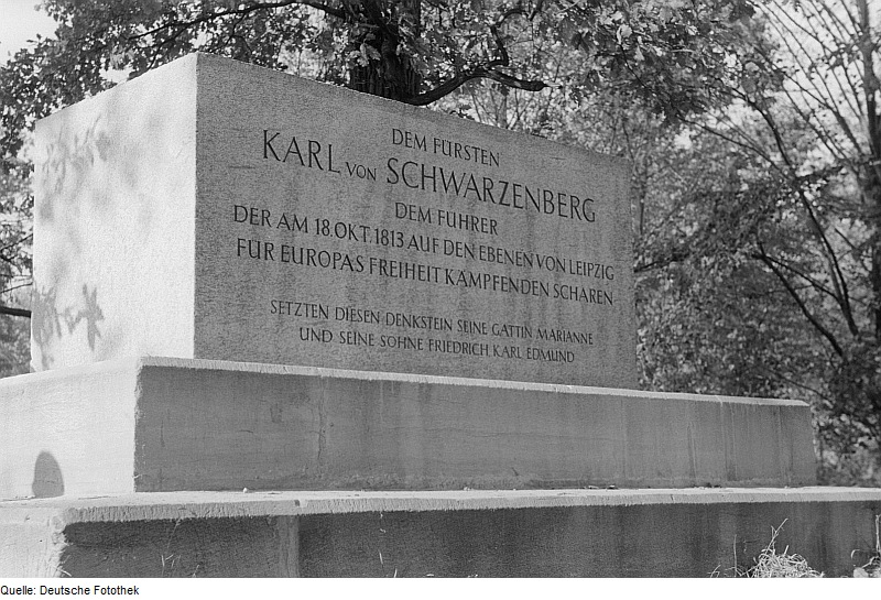 Original image description from the Deutsche Fotothek Gedenkstein für den Fürsten Karl von Schwarzenberg